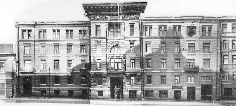 Доходный дом Якова Бабушкина на Покровке, № 29 (1897)